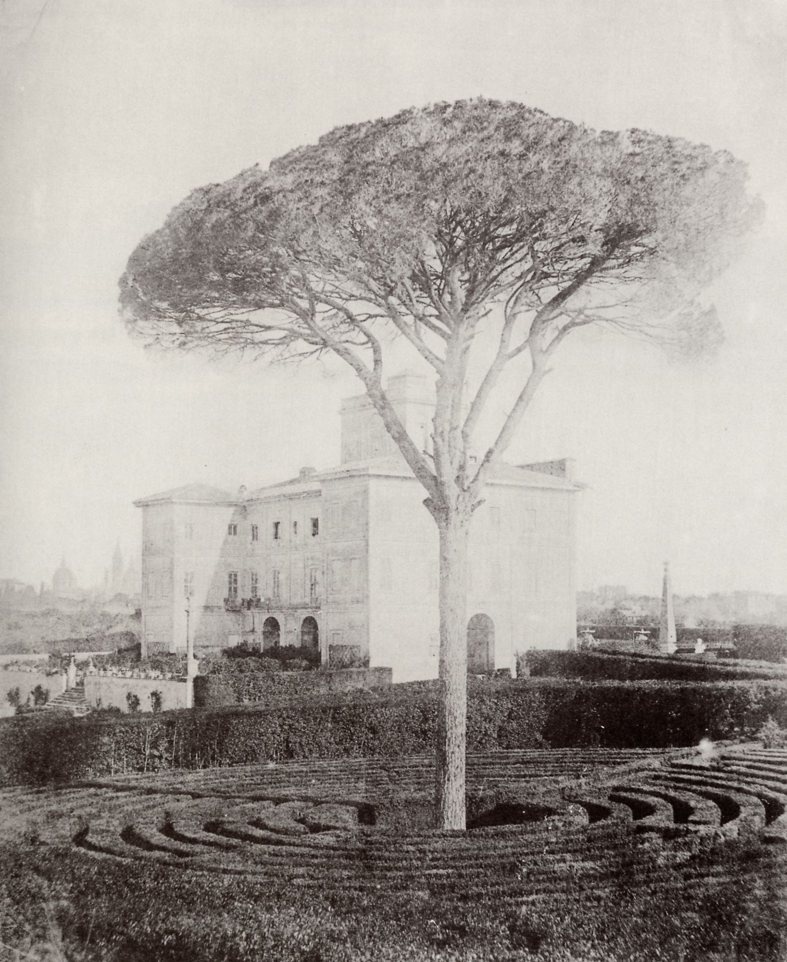 Italienischer Photograph um 1852: Villa Altieri